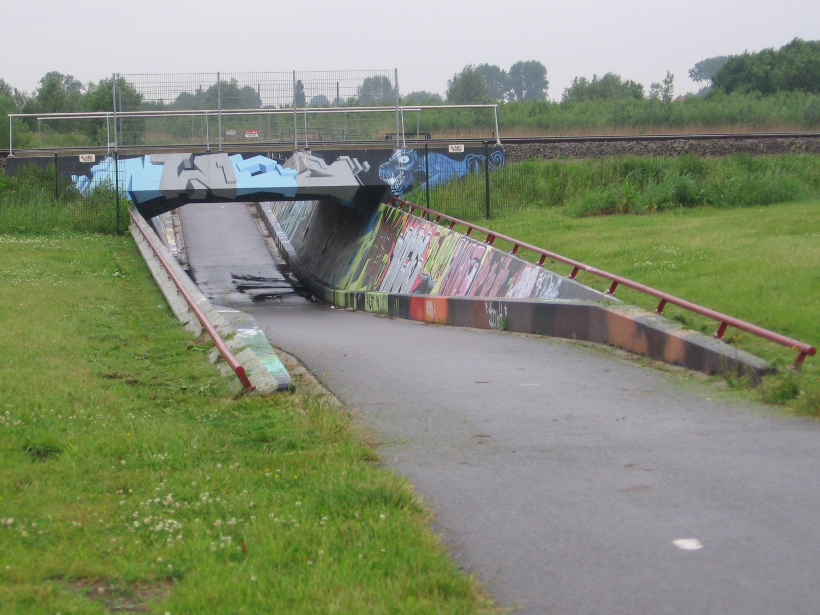 Fietstunnel onder spoorweg in Abtswoudse park, Delft